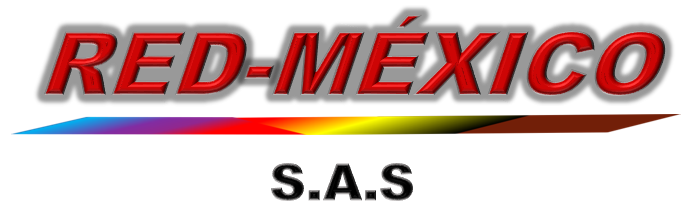 Logotipo Oficial de La Red México